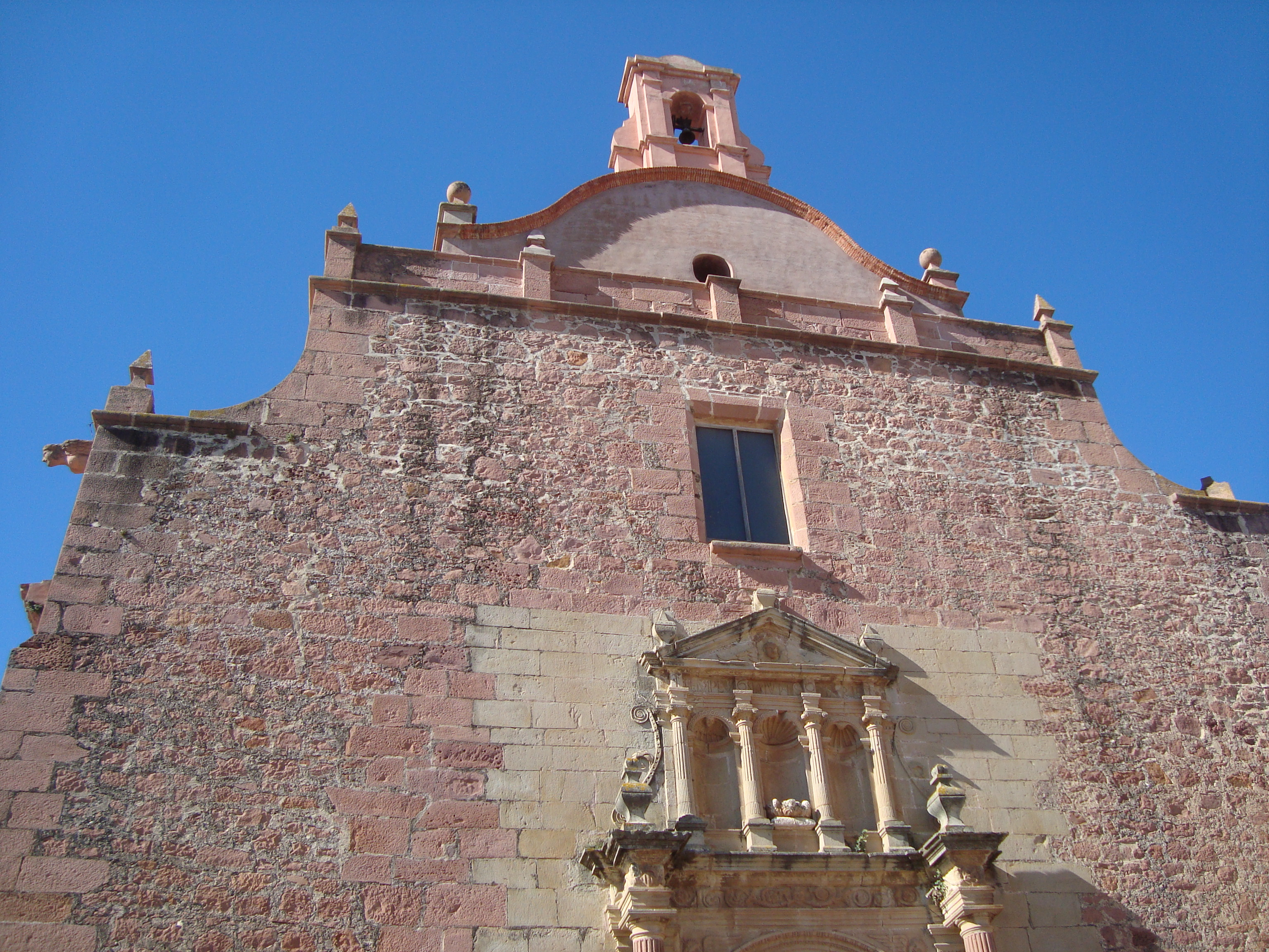 Església parroquial de l'Assumpció (Vilafamés) 05.128-004.